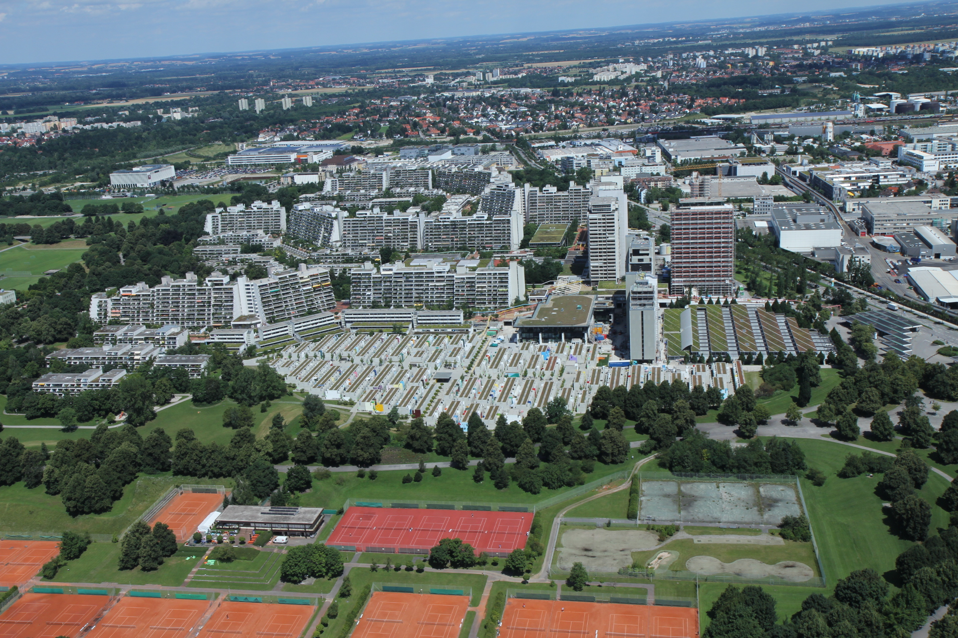 Wikipedia im Landtag – Bayern 17. bis 19. Juli 2012 in München Dieses Foto wurde im Rahmen des Projektes „Wikipedia im Landtag“ erstellt.